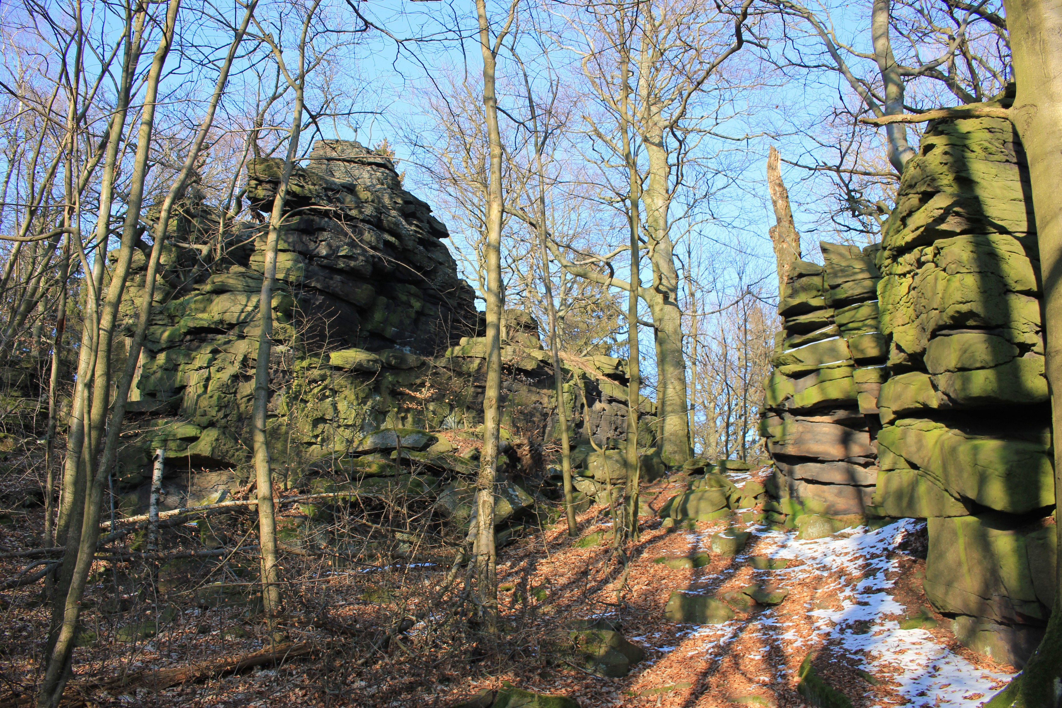 Hornjoserbsce: Skały na wjeršku Rubježneho hrodu.